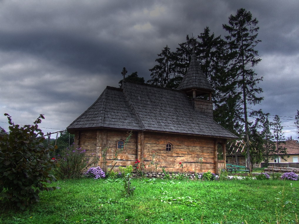 Biserica de lemn din Mura Mare, judeţul Mureş. Vedere de ansamblu.